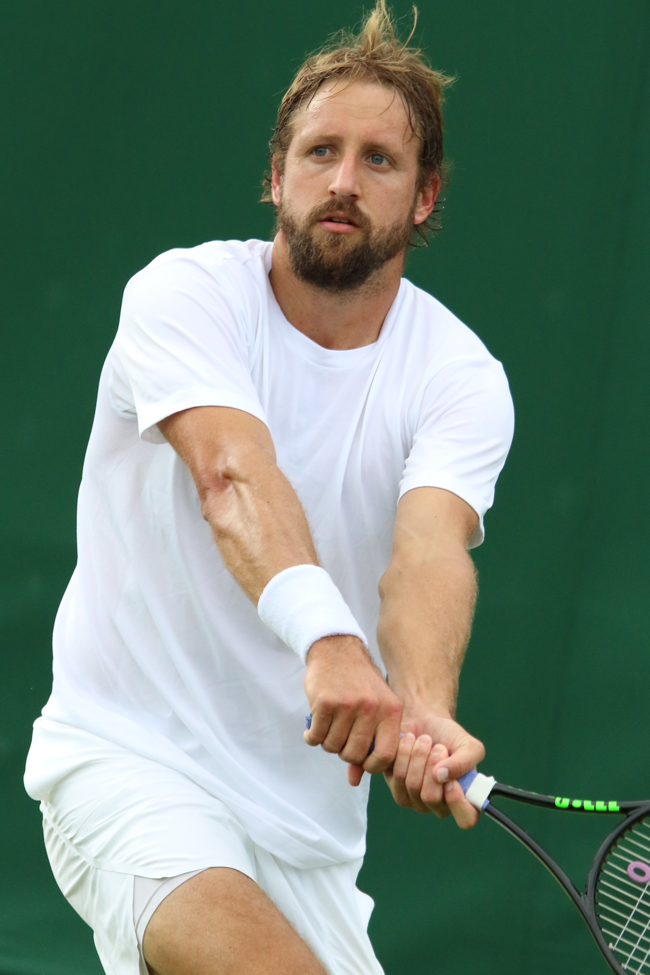 Sandgren WM19 (13)